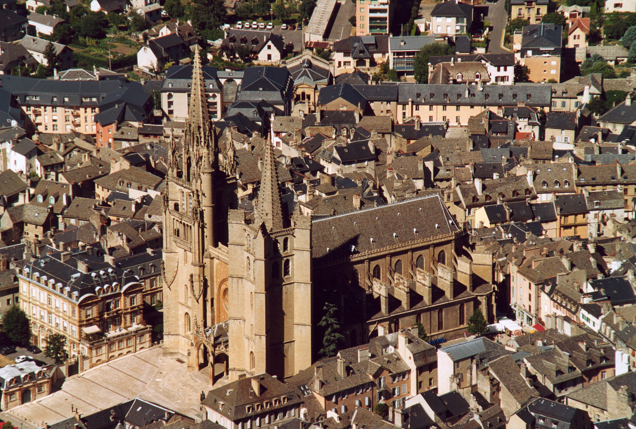 France Lozère Mende La Cathédrale Photographie prise par GIRAUD Patrick Août 2005